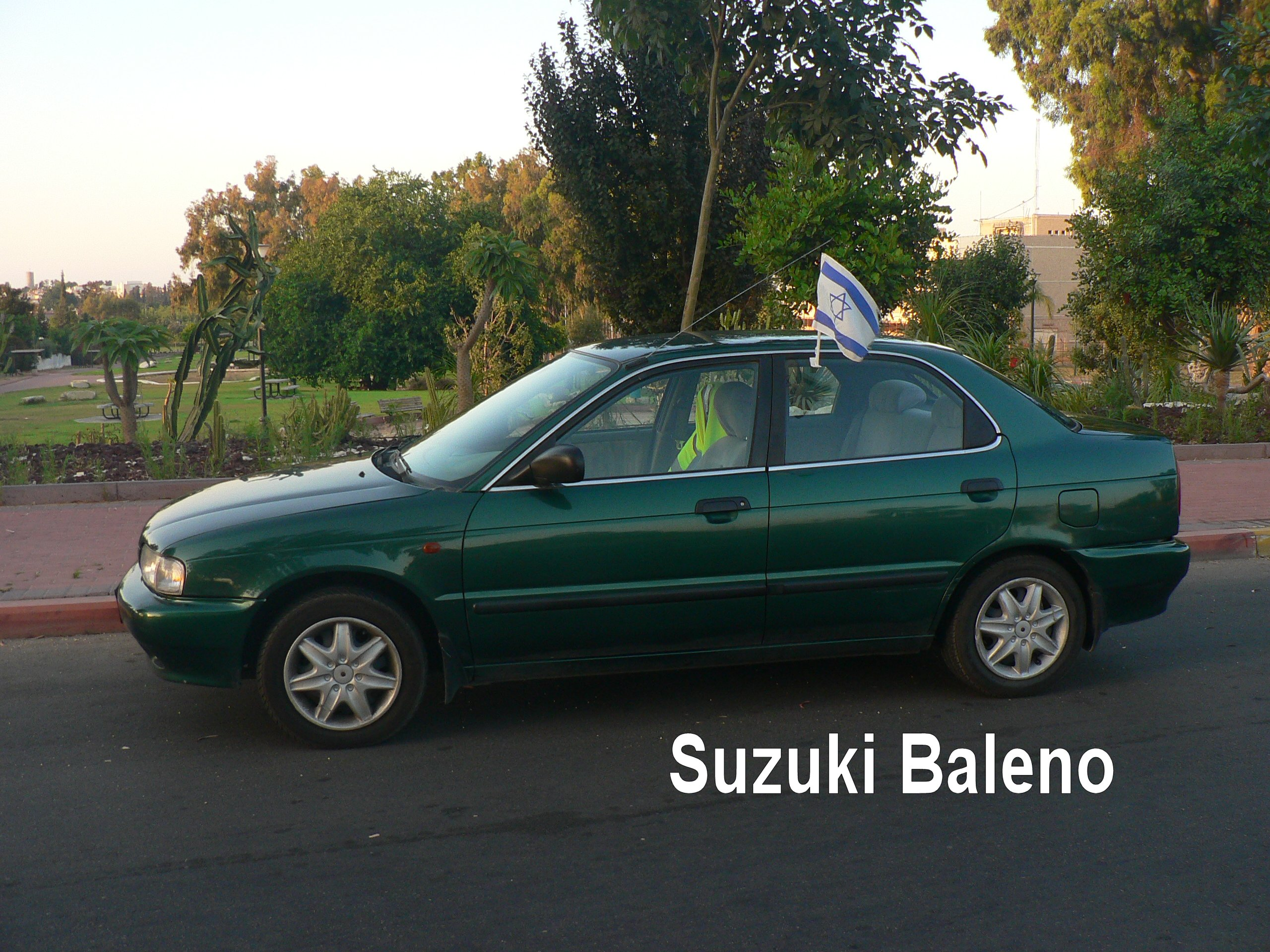 Suzuki Baleno Model 1998 סוזוקי בלנו